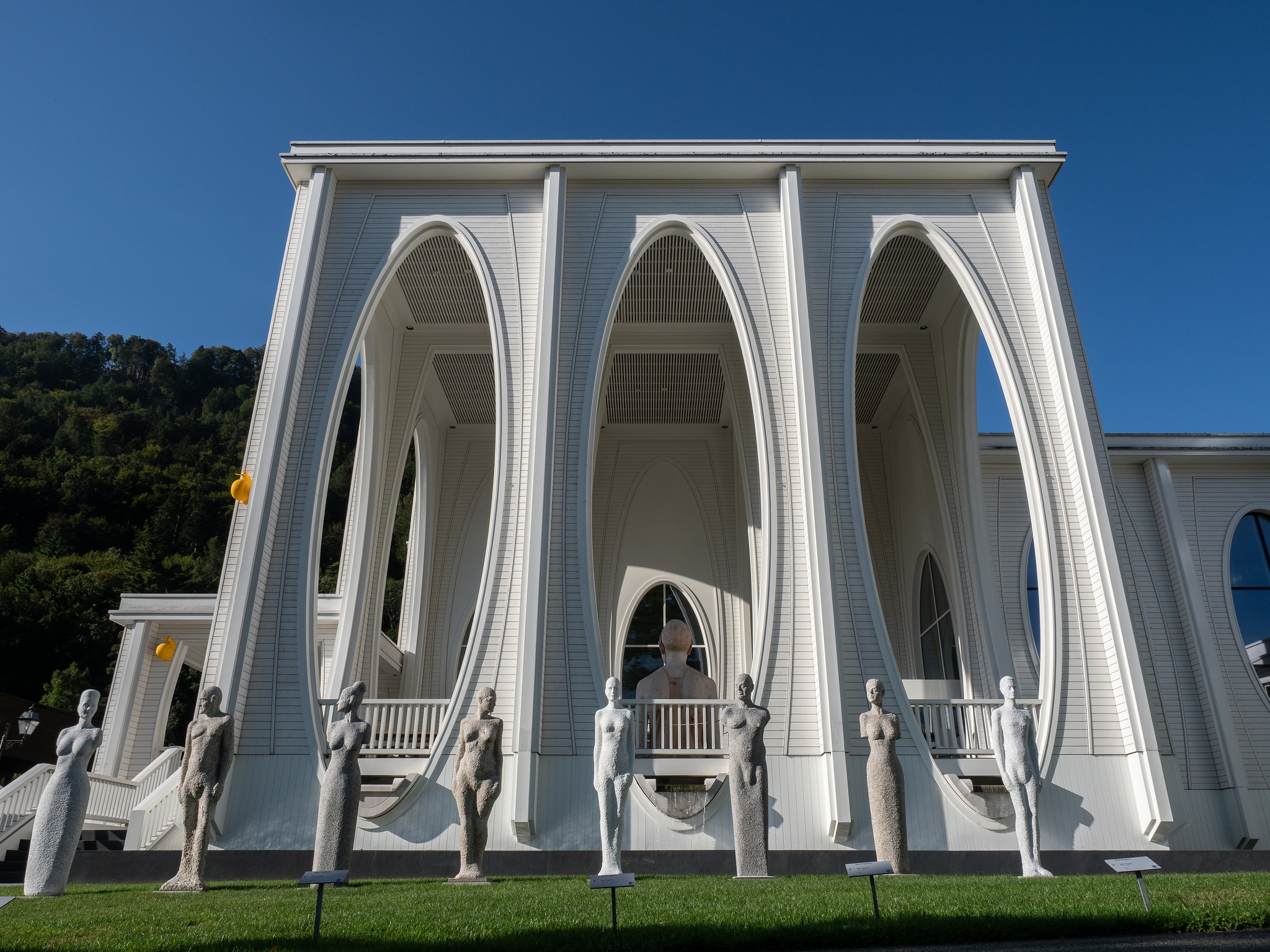 Tamina Therme im Grand Ressort